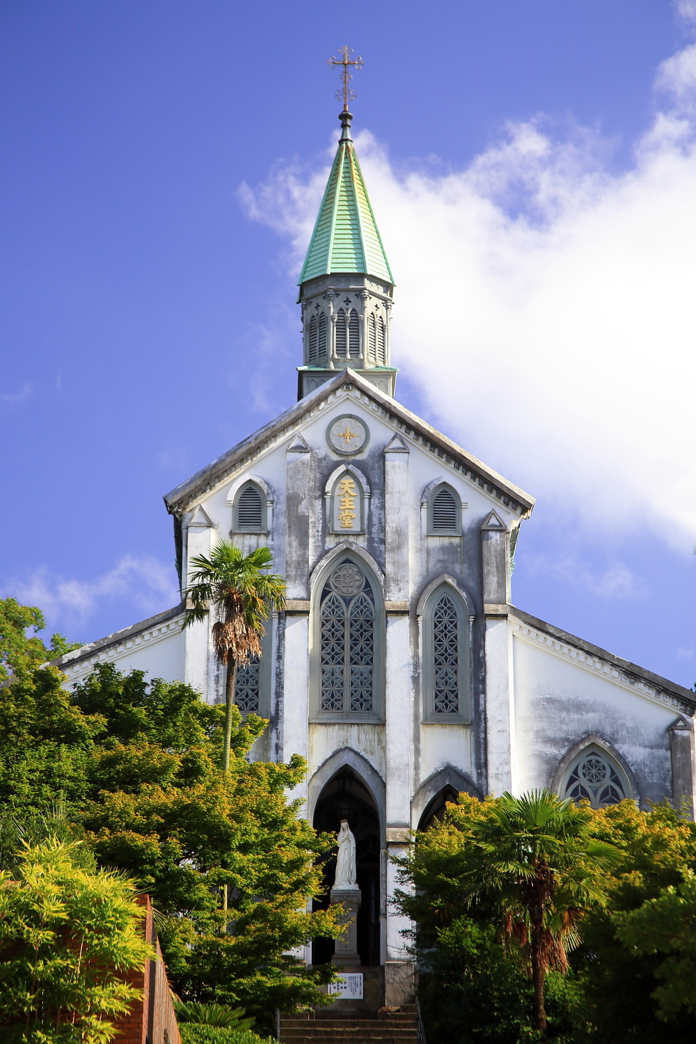 大浦天主堂（長崎市、2014年（平成26年）7月）